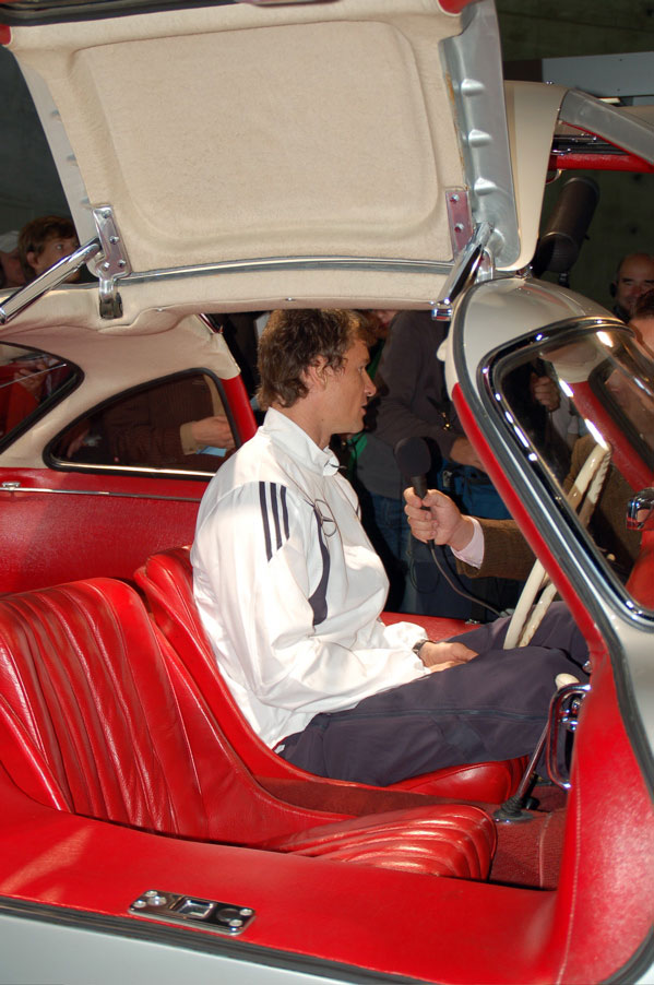 Jens Lehmann beim Interview im Mercedes-Benz Museum in Stuttgart